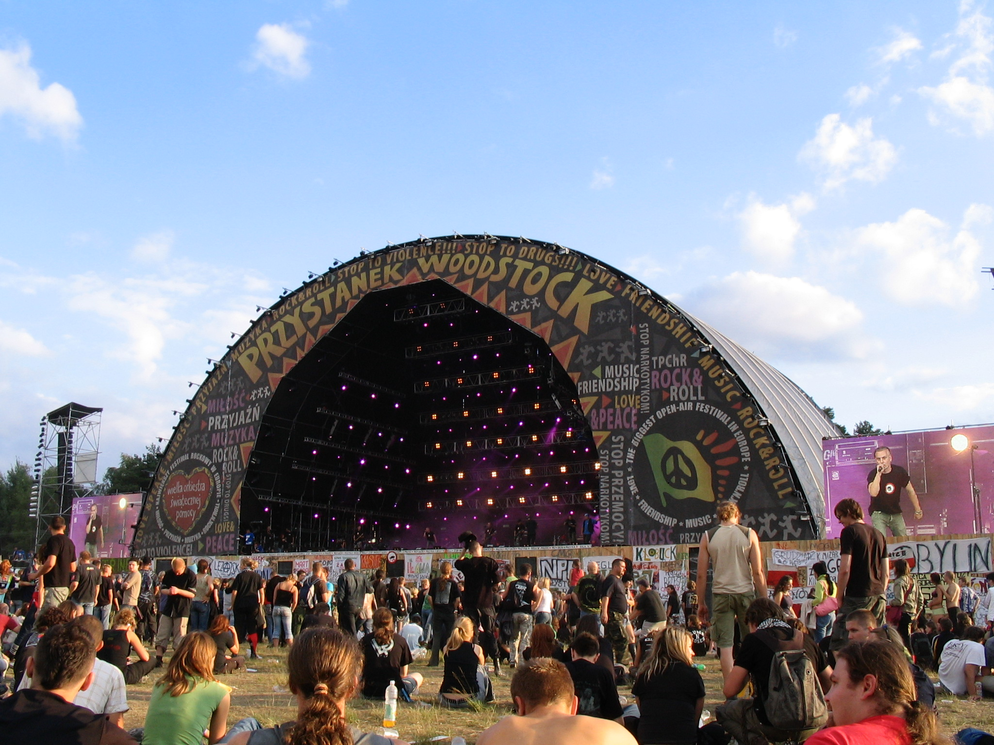 Woodstock 2007